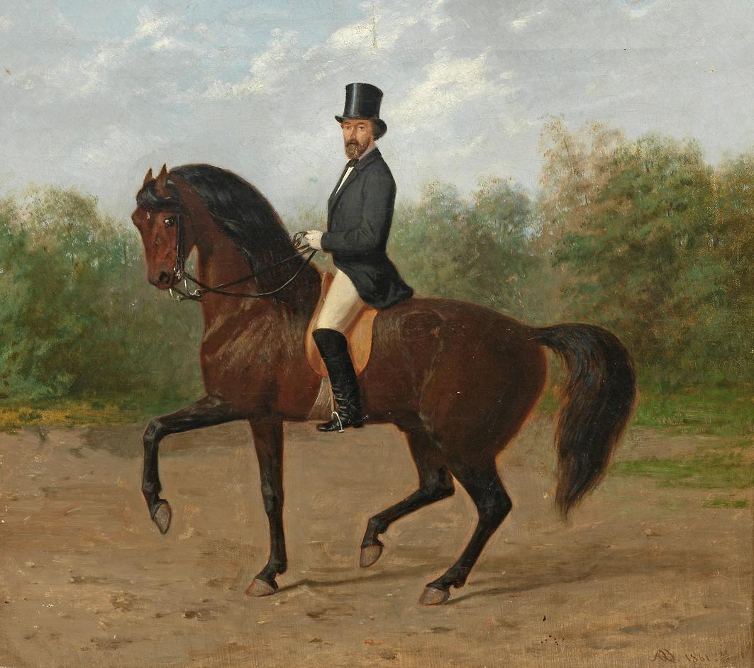 Reiter im Berliner Tiergarten. Bildnis eines vornehmen Reiters mit Zylinder